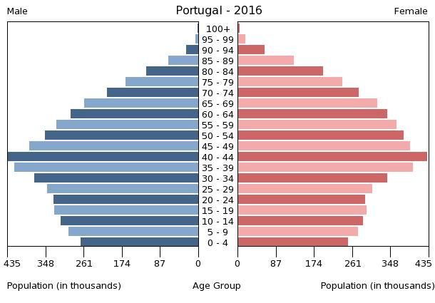 A population pyramid illustrates the age and sex structure of a country's population and may provide insights about political and social stability, as well as economic development. The population is distributed along the horizontal axis, with males shown on the left and females on the right. The male and female populations are broken down into 5-year age groups represented as horizontal bars along the vertical axis, with the youngest age groups at the bottom and the oldest at the top. The shape of the population pyramid gradually evolves over time based on fertility, mortality, and international migration trends.